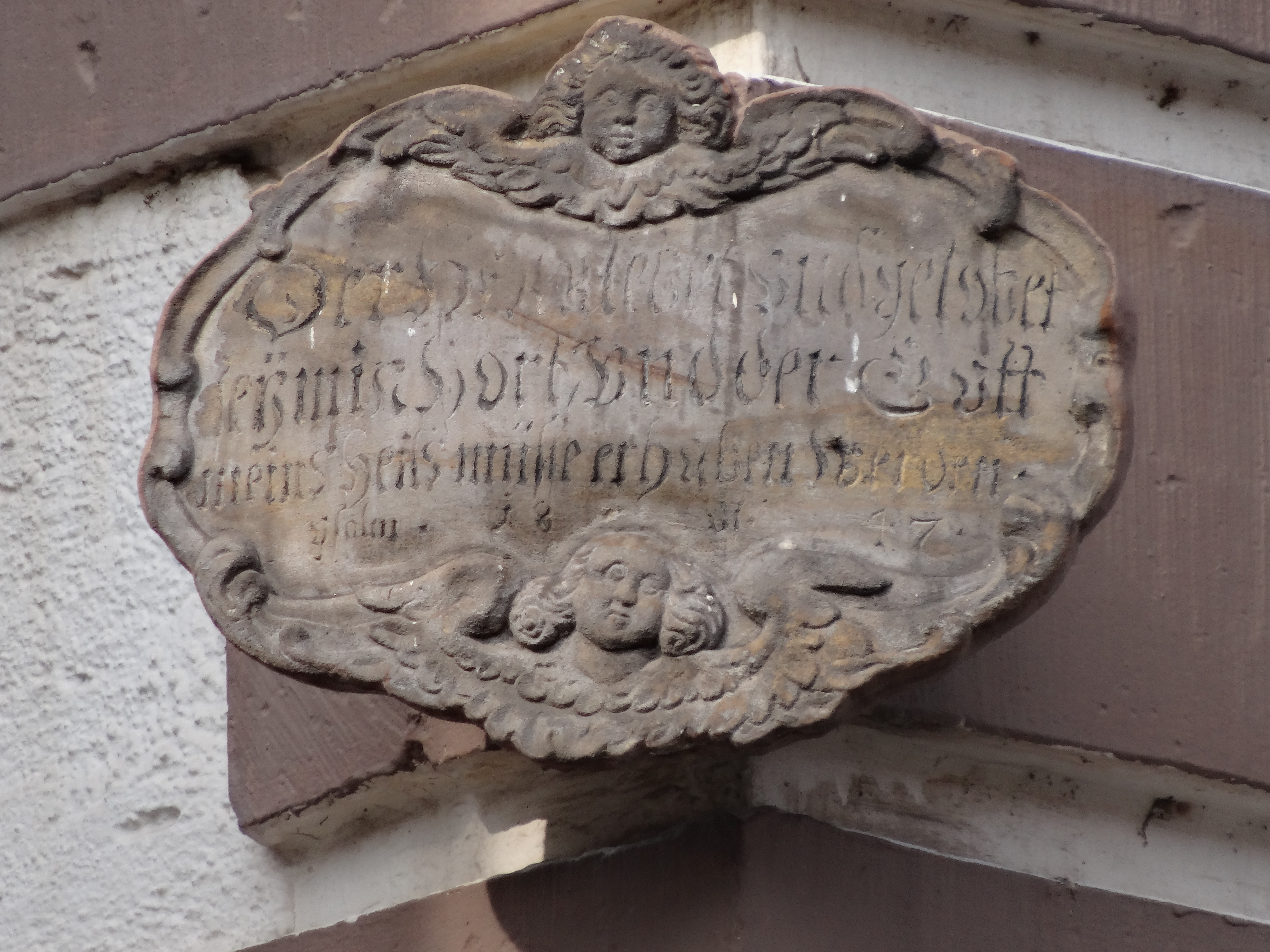 Straßeneckentafel Hauptmarkt 26, Gotha, Thüringen